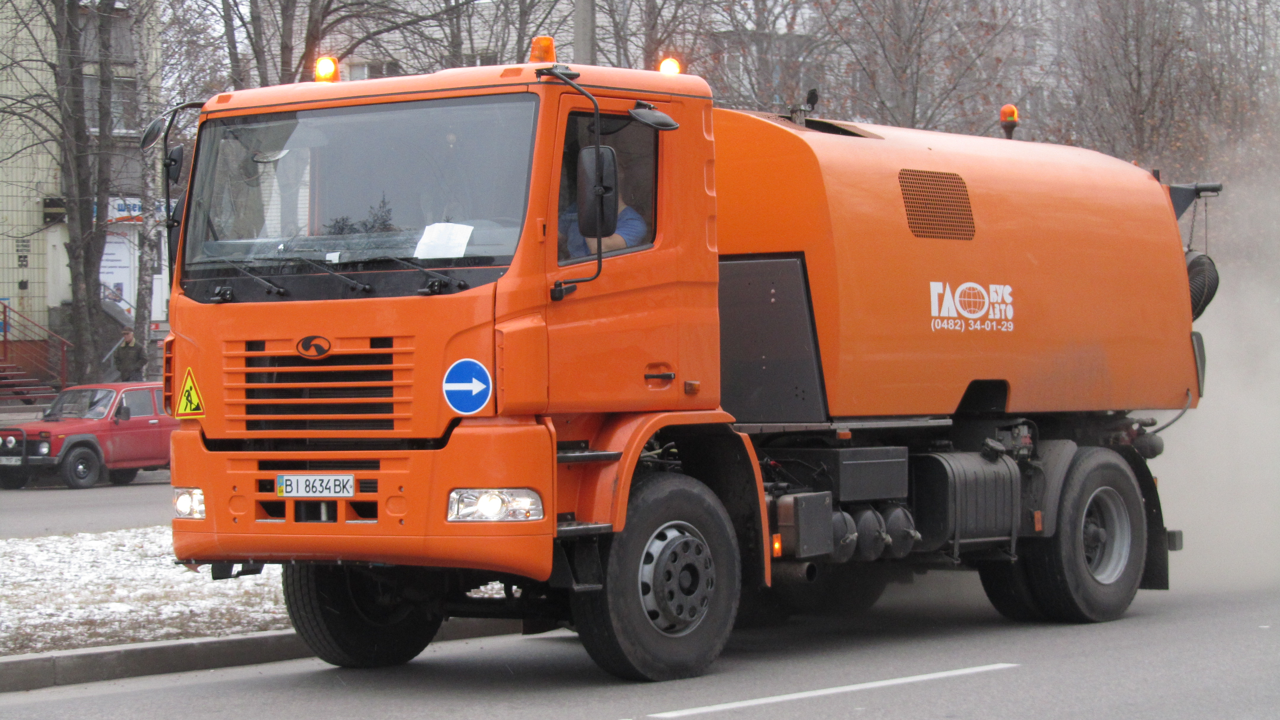 Вакуумна підмітально-прибиральна машина КрАЗ К12.2